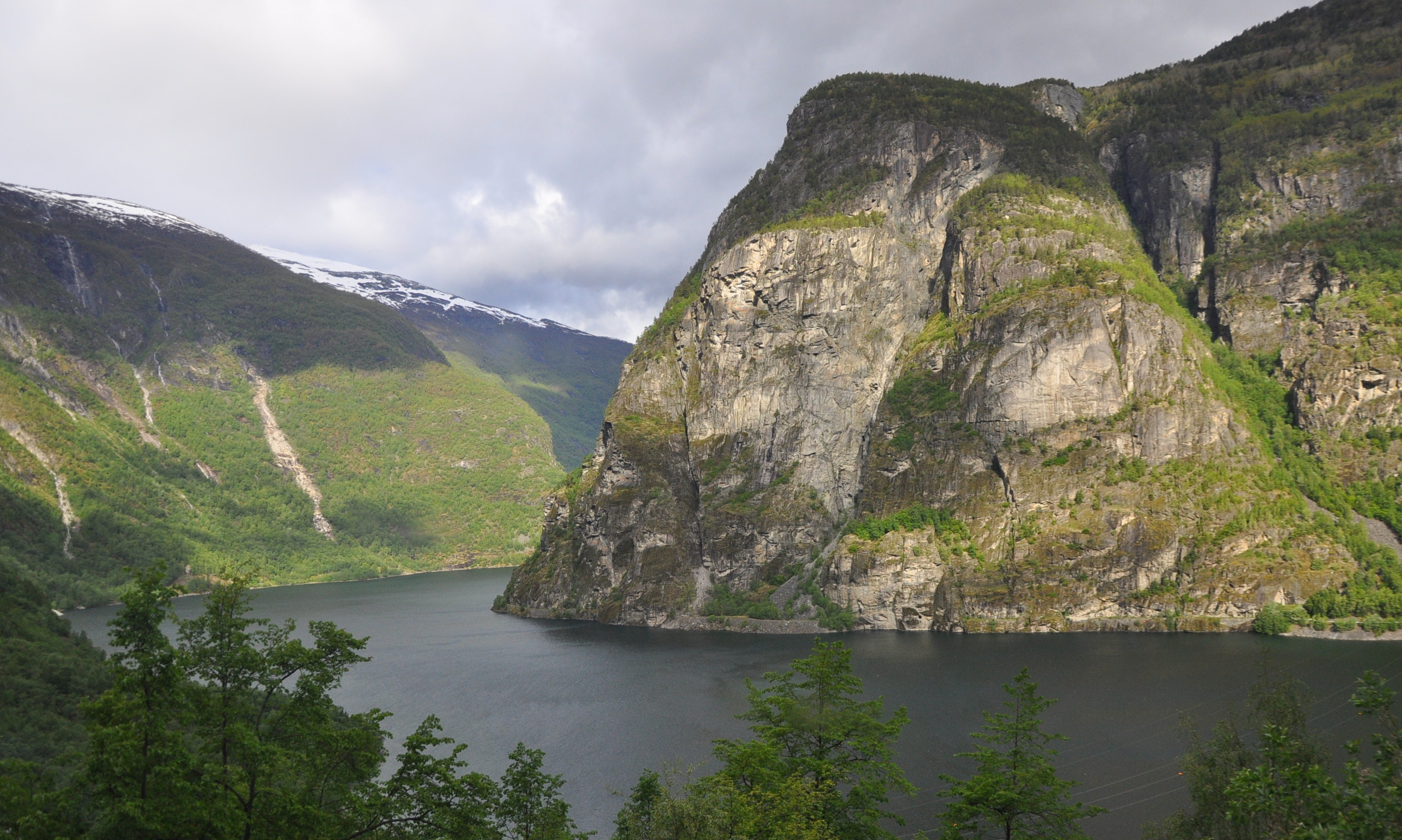 Lake Vassbygdevatnet in Aurland, Norway.